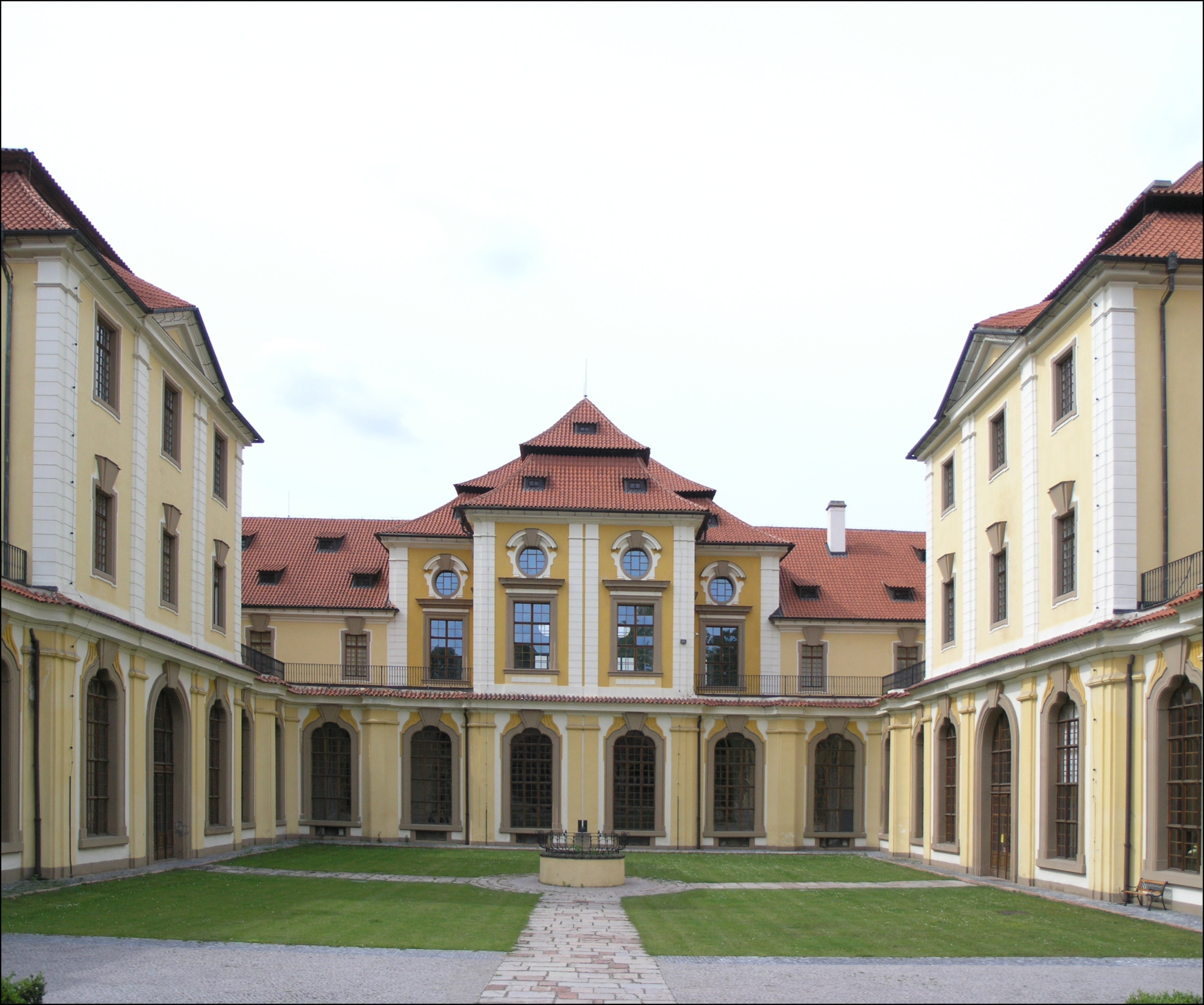 Zbraslavský zámek v Praze